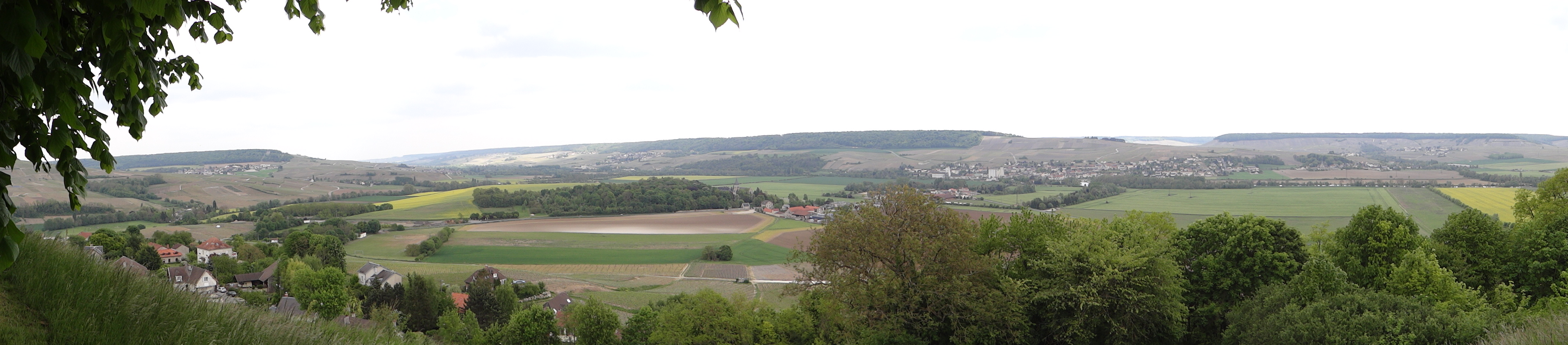 Châtillon-sur Marne, Panorama de la statue d'Urbain II